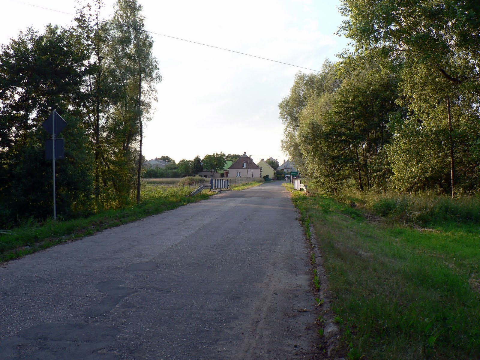 Droga do Wylatowa od południa